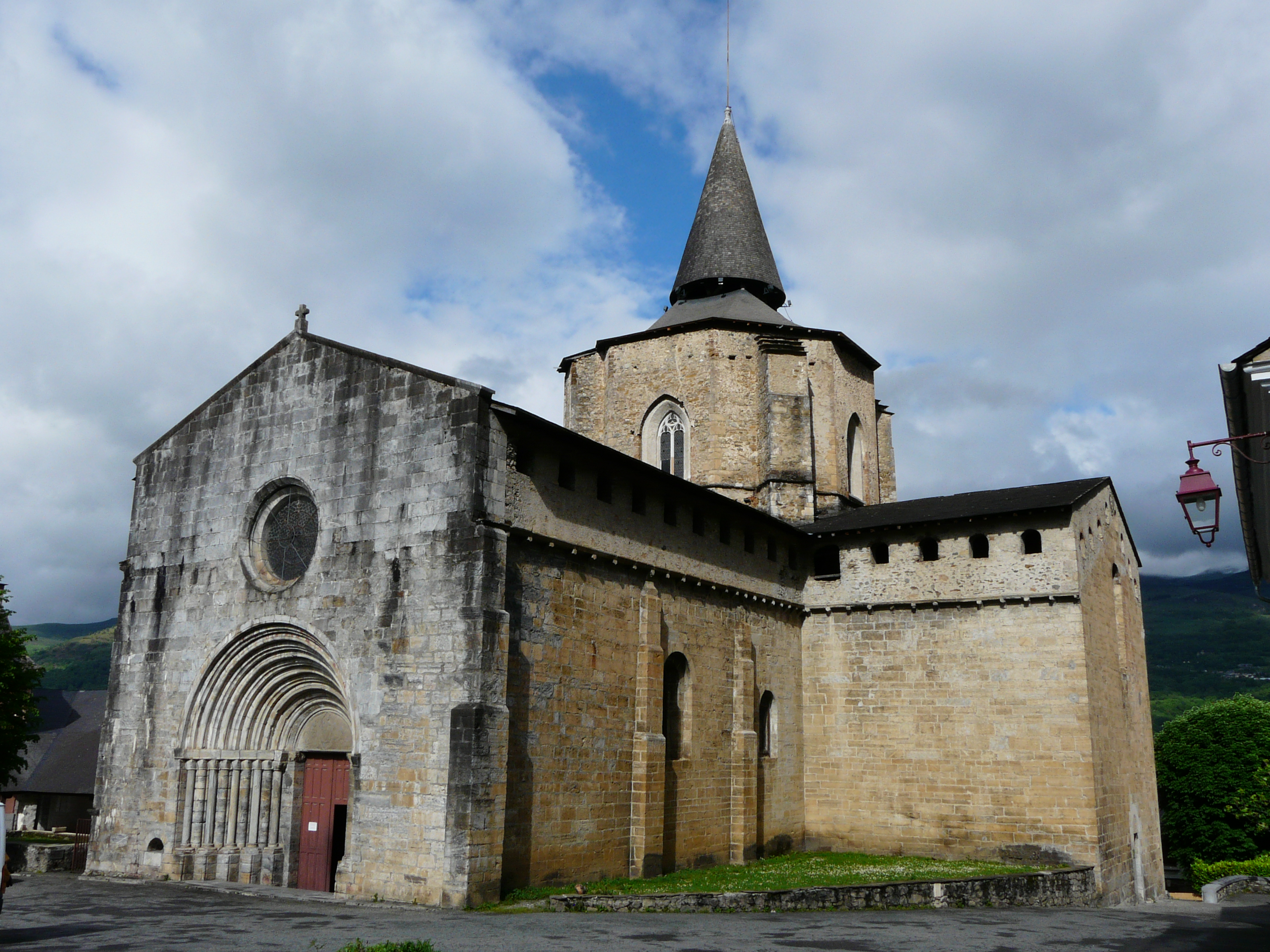 L'église abbatiale de Saint-Savin, Hautes-Pyrénées, France.